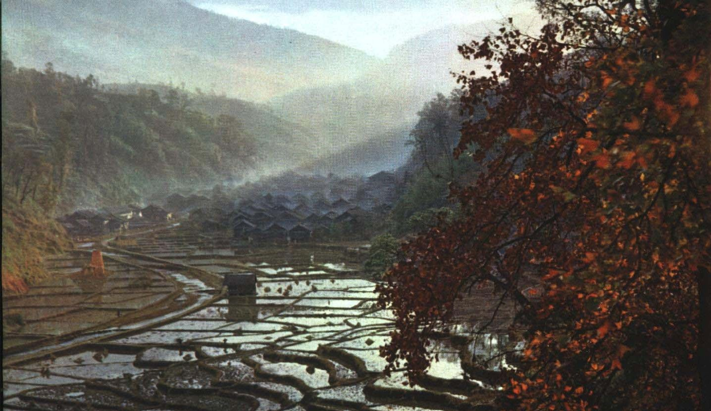 1964-05 1964年 侗族山寨